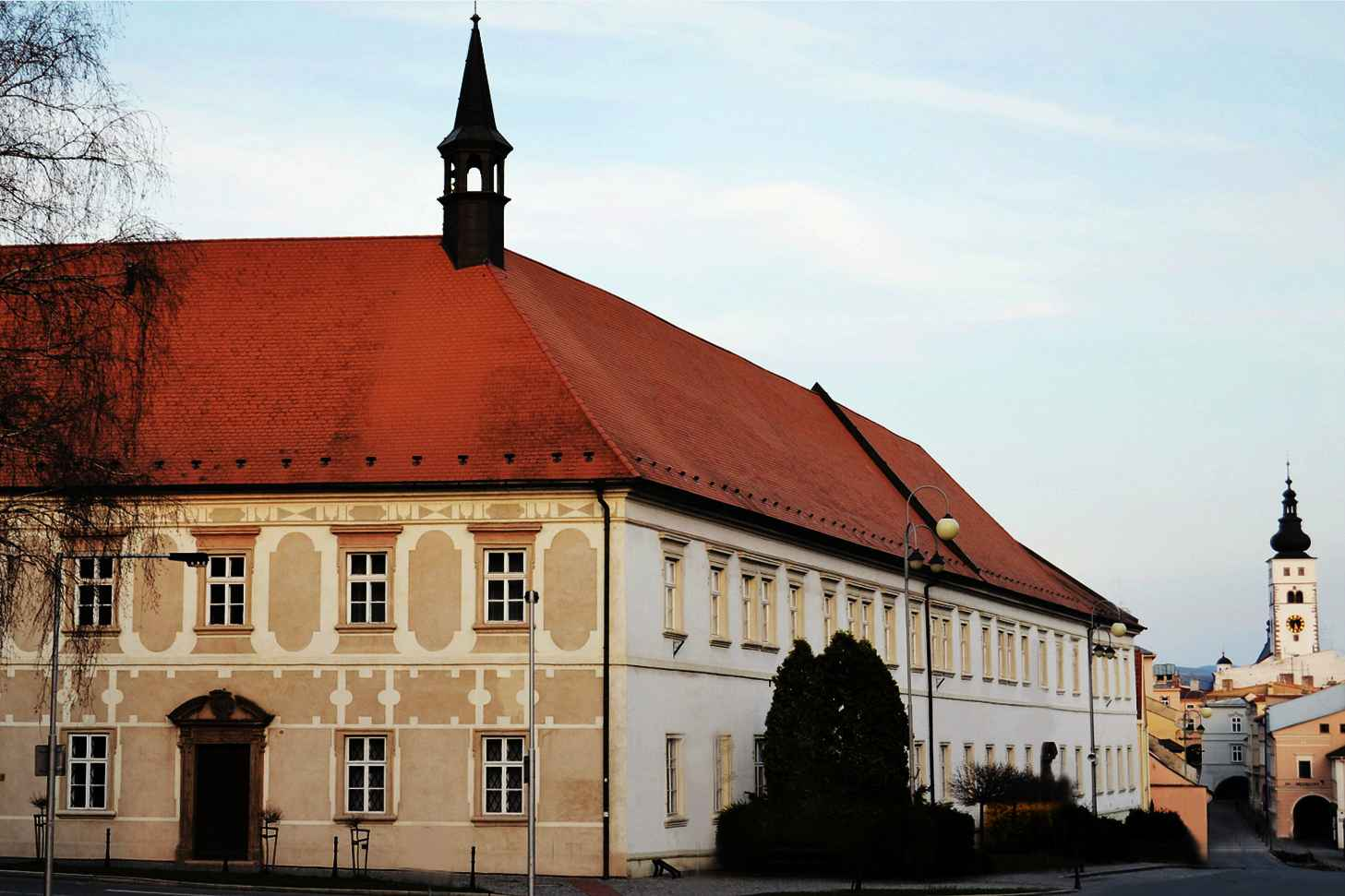 Muzeum a pamětní síň Sigmunda Freuda v Příboře. Muzeum je umístěno v bývalém piaristickém klášteře.